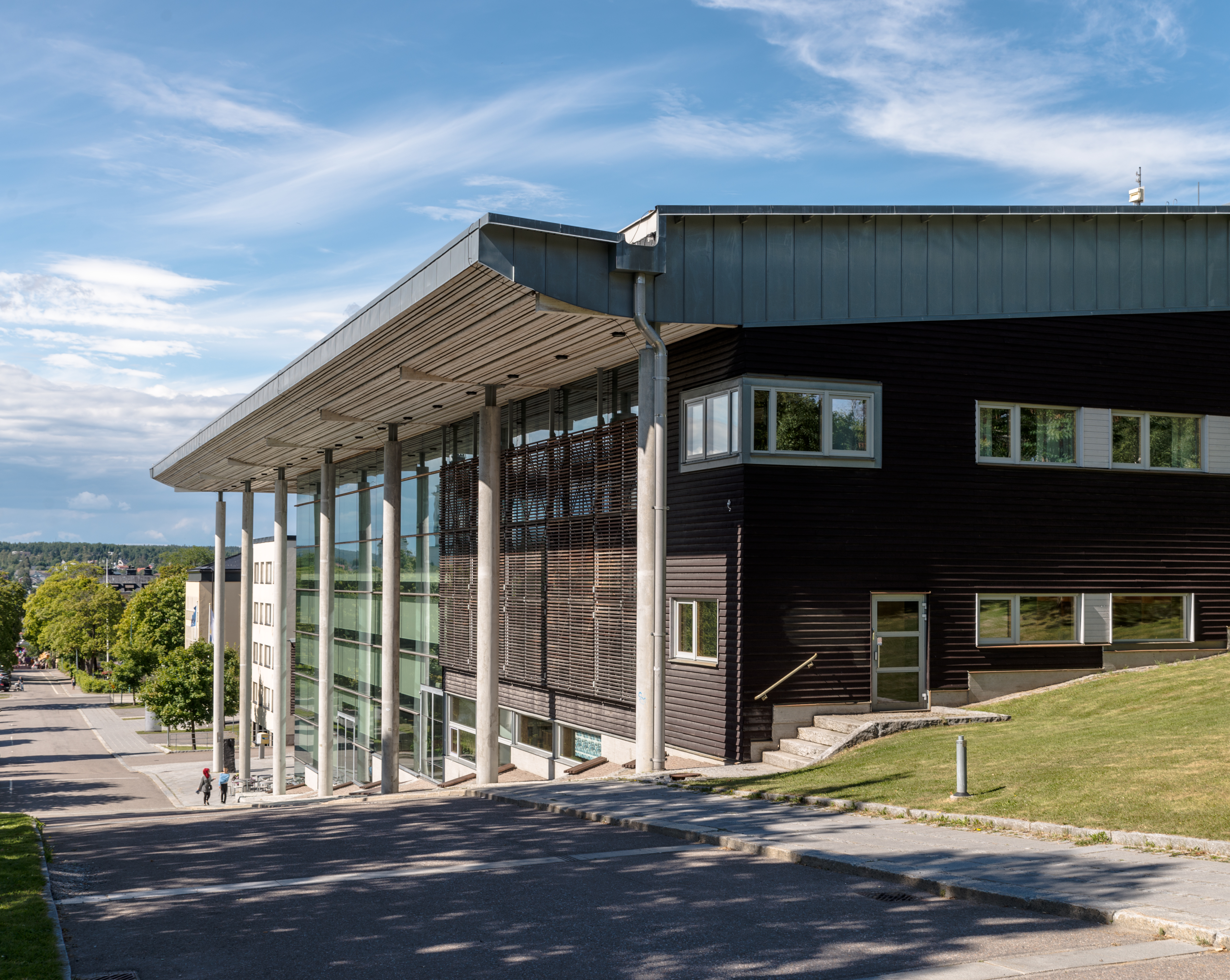 Sambiblioteket